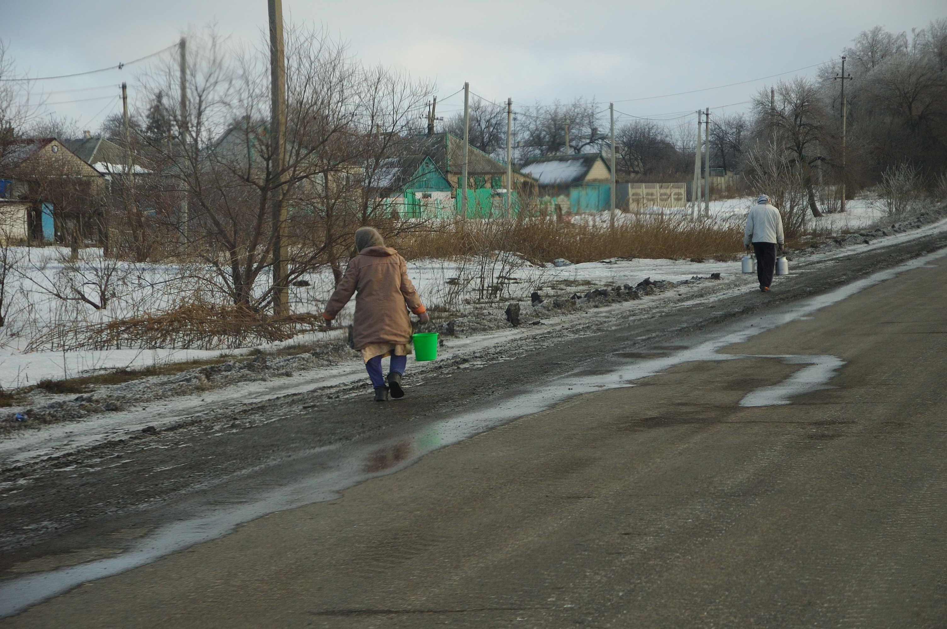 Жителі Дебальцевого, які не виїхали в Україну як біженці, несуть воду з криниці.